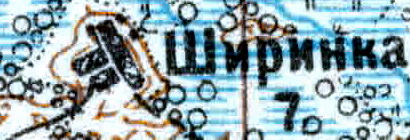 Топографическая карта Ленинградской области, квадрат VIc-28 (Луга), деревни Ширенка